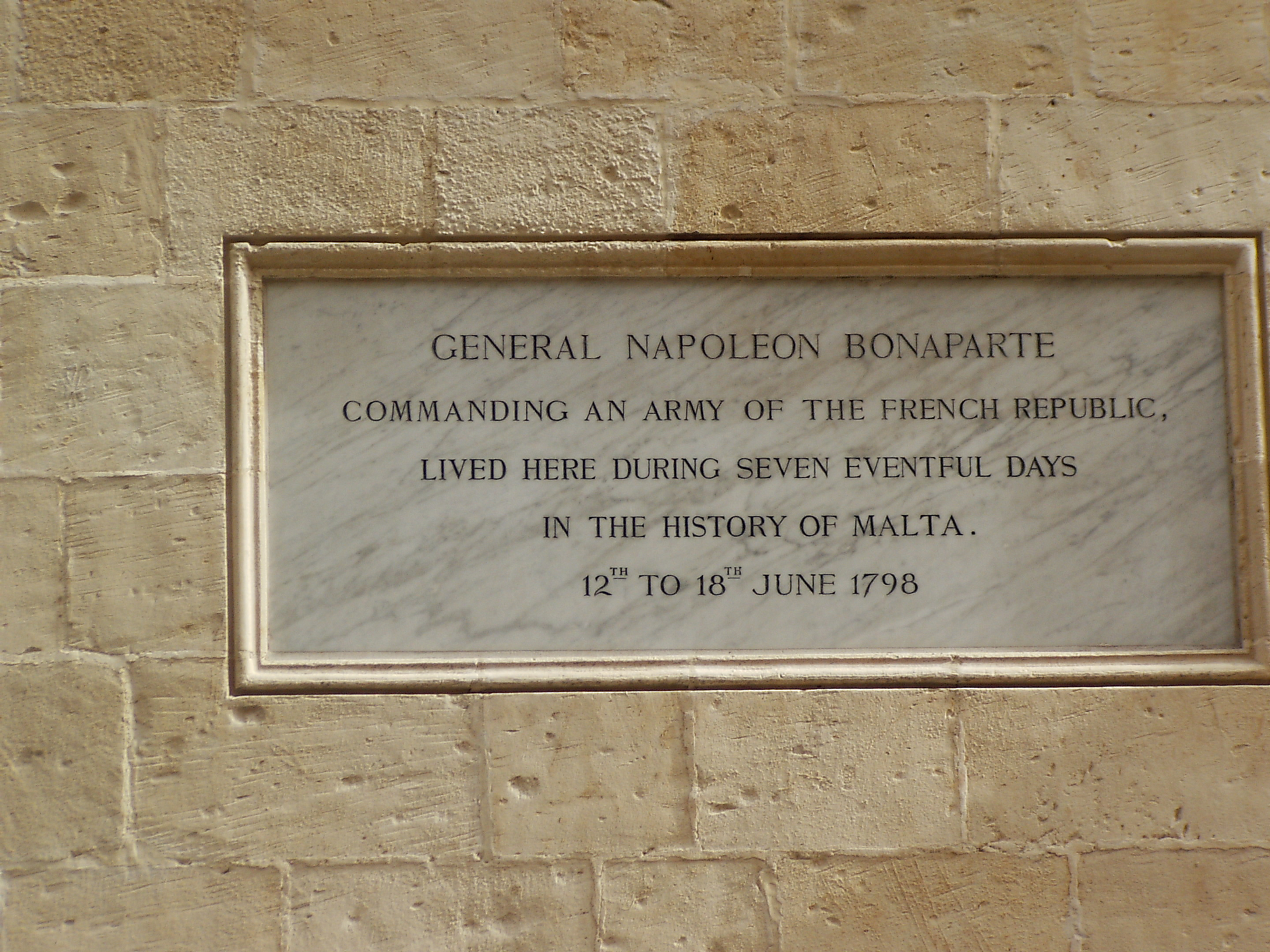 Мемориална плоча на Palazzo Parisio където е пребивавал Наполеон във Валета, Малта през юни 1798